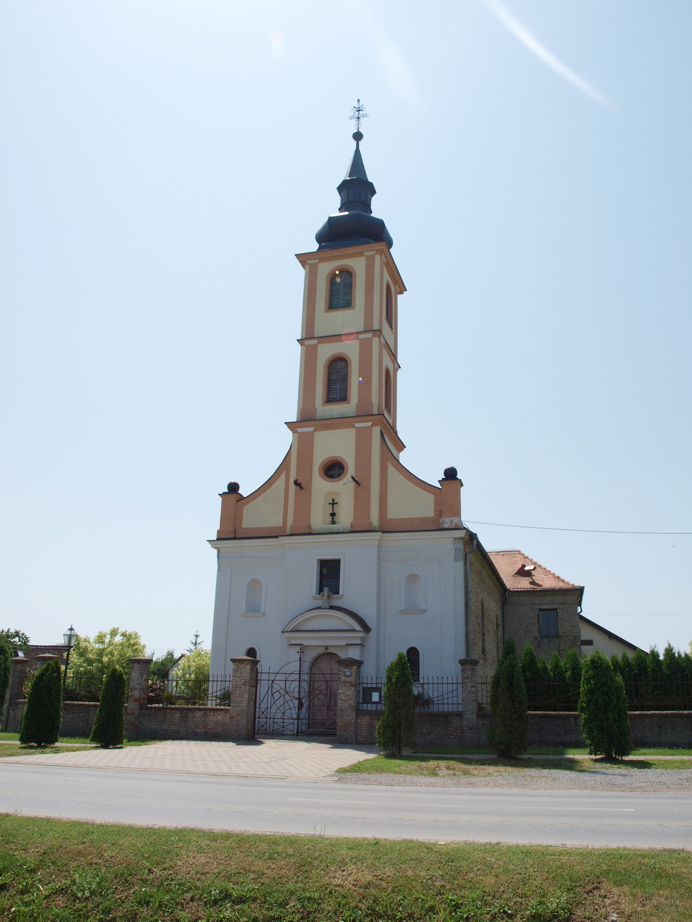 Crkva Sv._Matej,_ap._i_ev. u Garčinu, Brodsko-posavska županija.